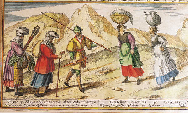 Grabado de Georgio Housnaglio en 1567. También incluído en «Theatrum Orbis Terrarum», obra de Abraham Ortelius, Amberes, en cuyo pie se lee «Donsellas Biscainas y Gasconas...» y puede verse a una de ellas con un cántaro a la cabeza que tiene semejanzas con el cántaro pirenaico (aunque por el tipo de asa abatible parece tratarse de una vasija metálica). Français cadien: La scène gravée par Georgio Housnaglio en 1567 nous montre la façon de s'habiller des paysans basques à cette époque. A gauche, deux femmes mariées et un homme s'acheminent vers Vitoria; elles portent de la laine filée ou en touffes pour la vendre au marché et couvrent leur tête de coiffures volumineuses dont les formes compliquées variaient d'un village à l'autre. L'homme, armé d'une pique et d'une arbalète, est revêtu de chausses, d'une chemise et d'un pourpoint aŭ manches ballonnées. Les deŭ jeunes filles qui se croisent sur le chemin se dirigent vers la rivière, en portant sur leur tête le linge à laver dans un panier rond et une cruche primitive remplie d'eau; les deŭ sont des jeunes célibataires et c'est pourquoi elles ont la tête découverte.